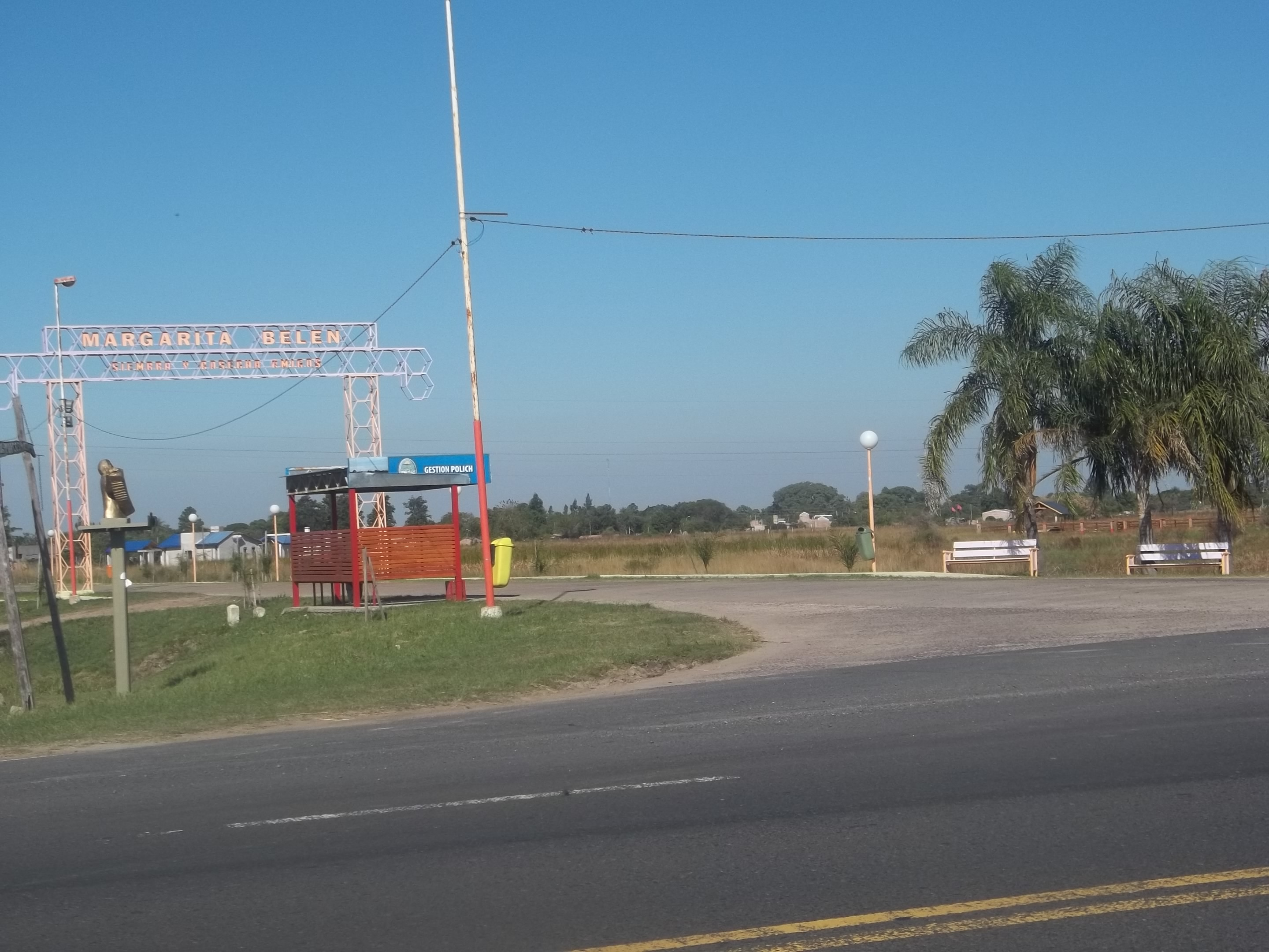 Cartel de entrada a Margarita Belén desde la Ruta Nacional 11.